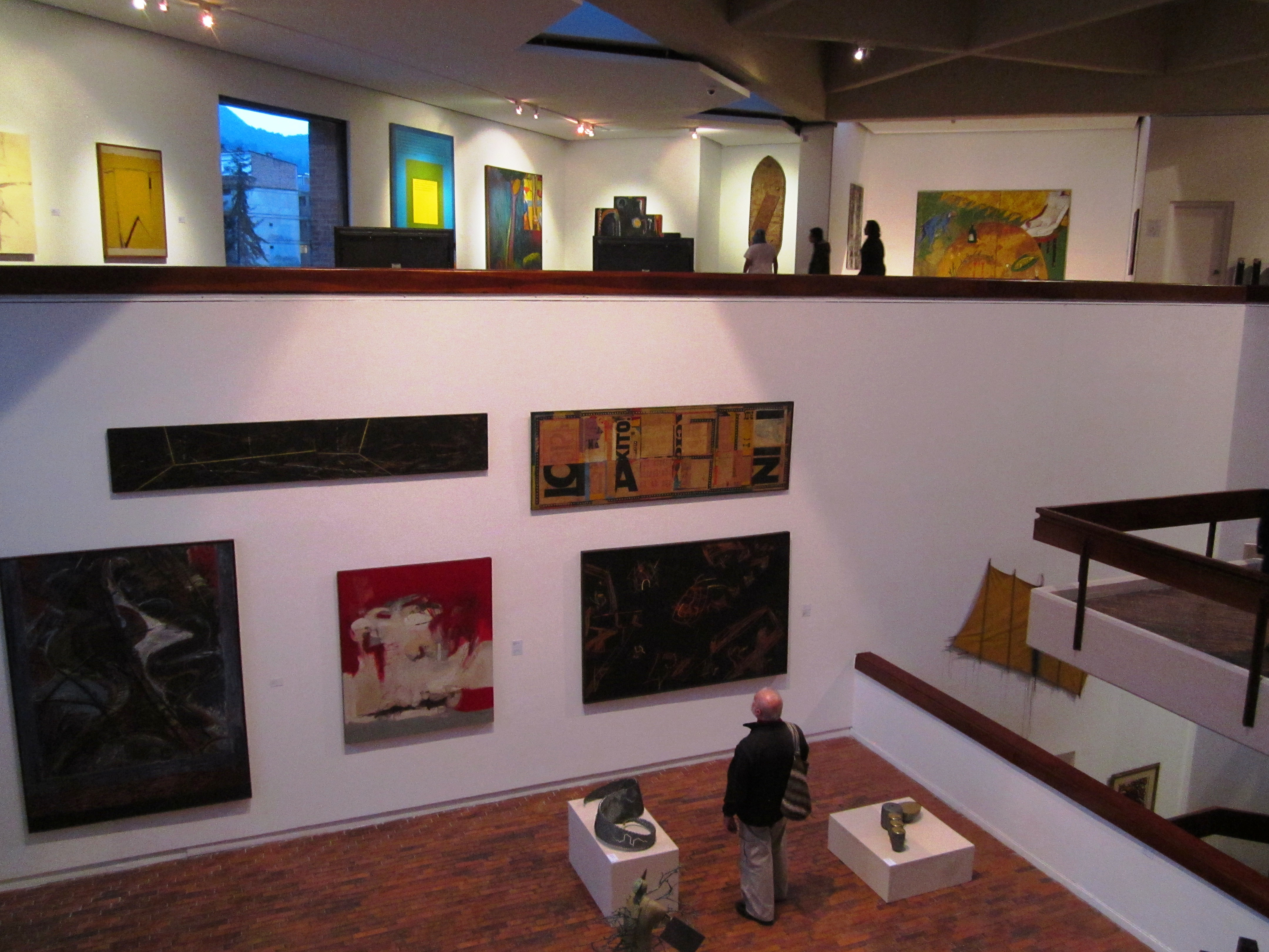 Bogotá, Museo de Arte Moderno, exposición 30 años del MAMBO, salas del segundo y tercer pisos.